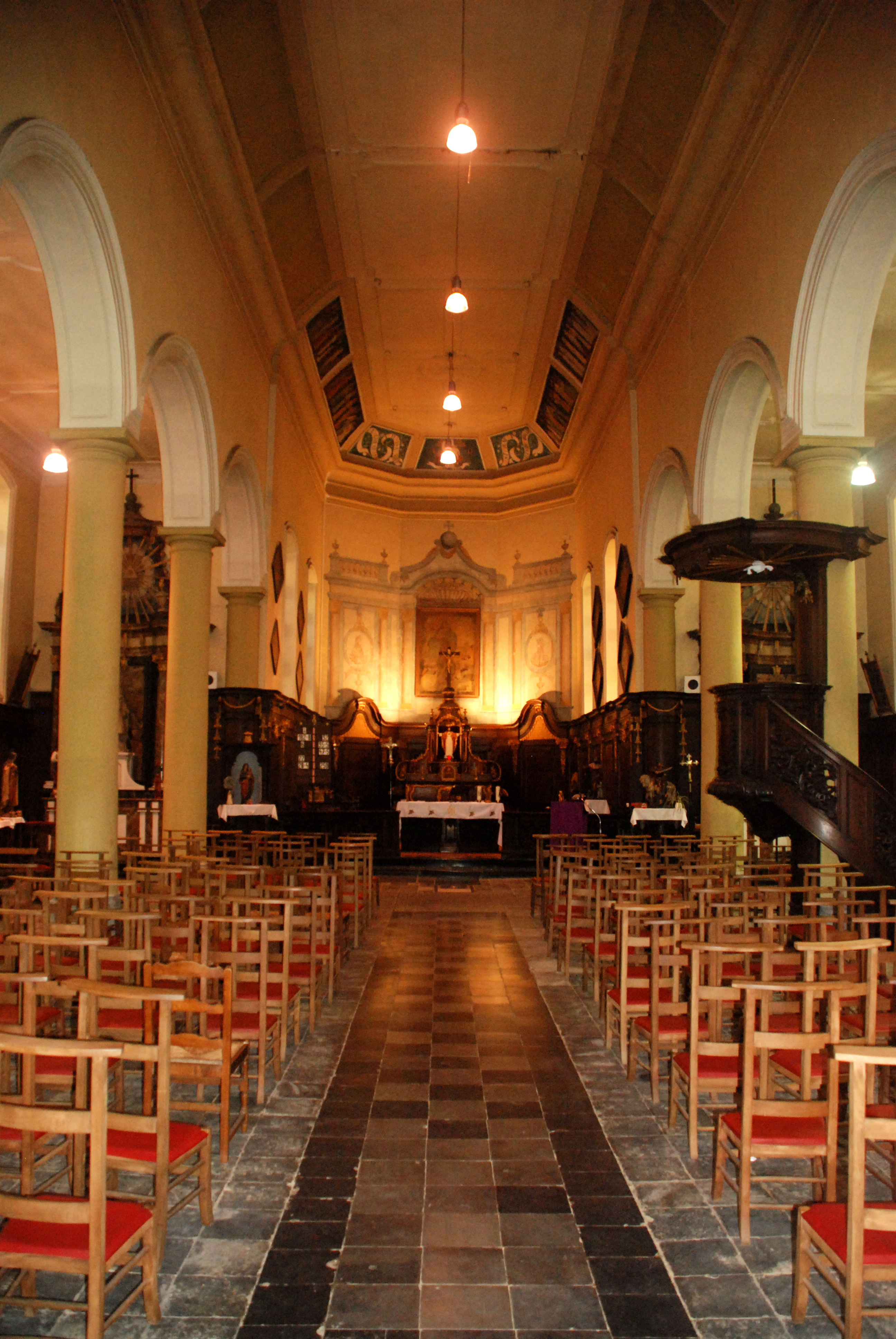 Belgique - Brabant wallon - Église Saint-Martin de Ways